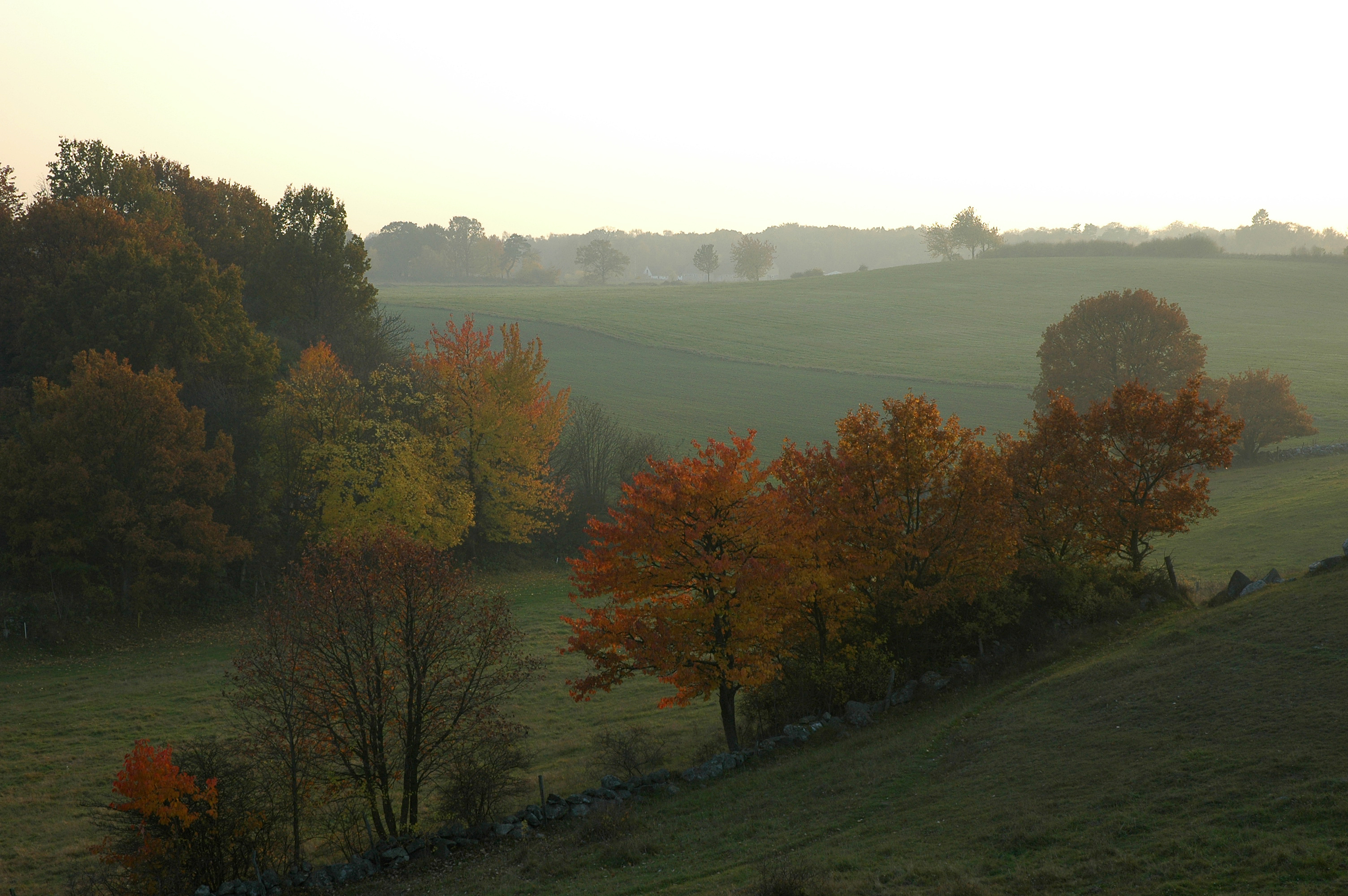 Brösarps backar på hösten